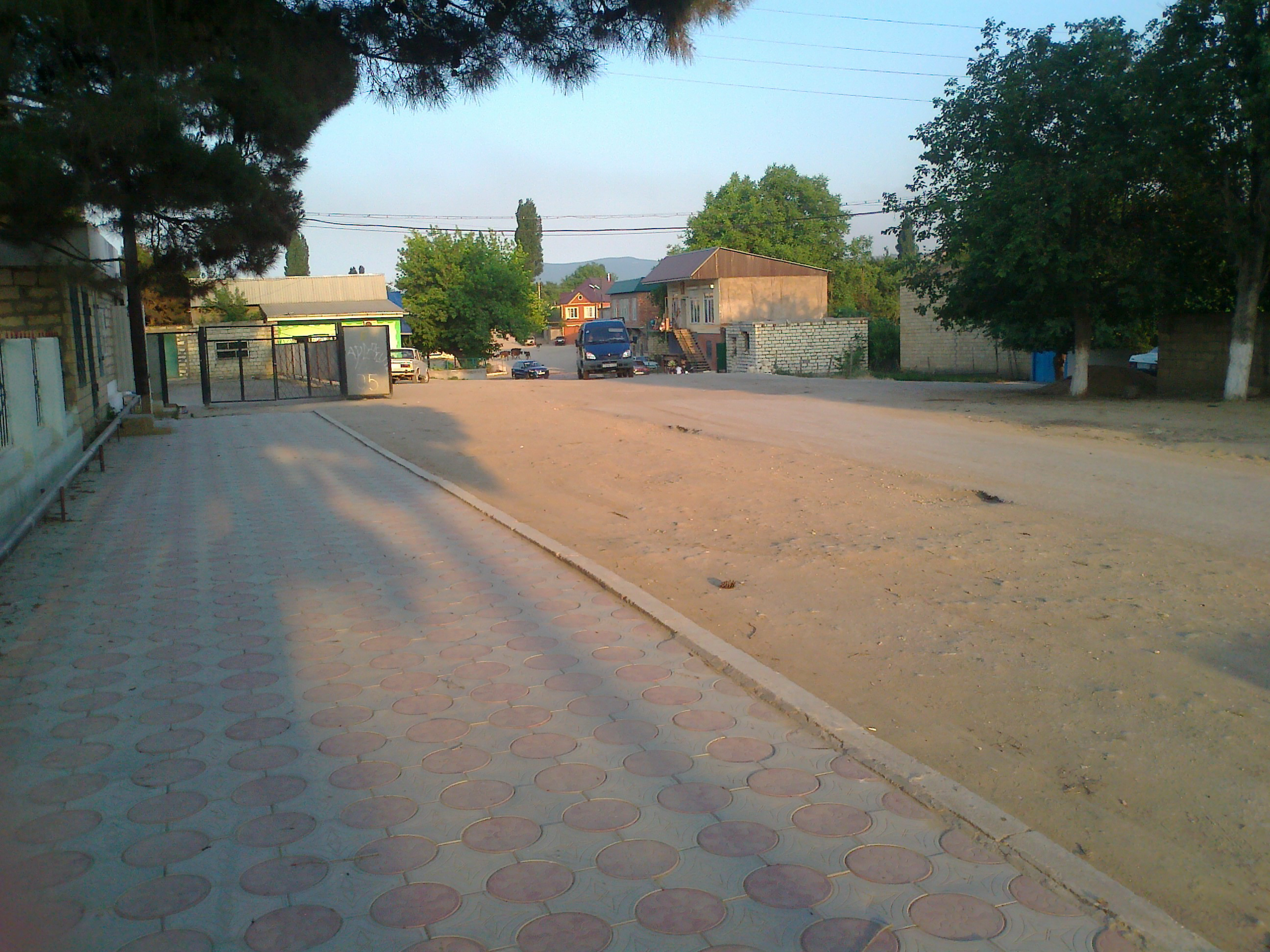 Фото центра села, у администрации